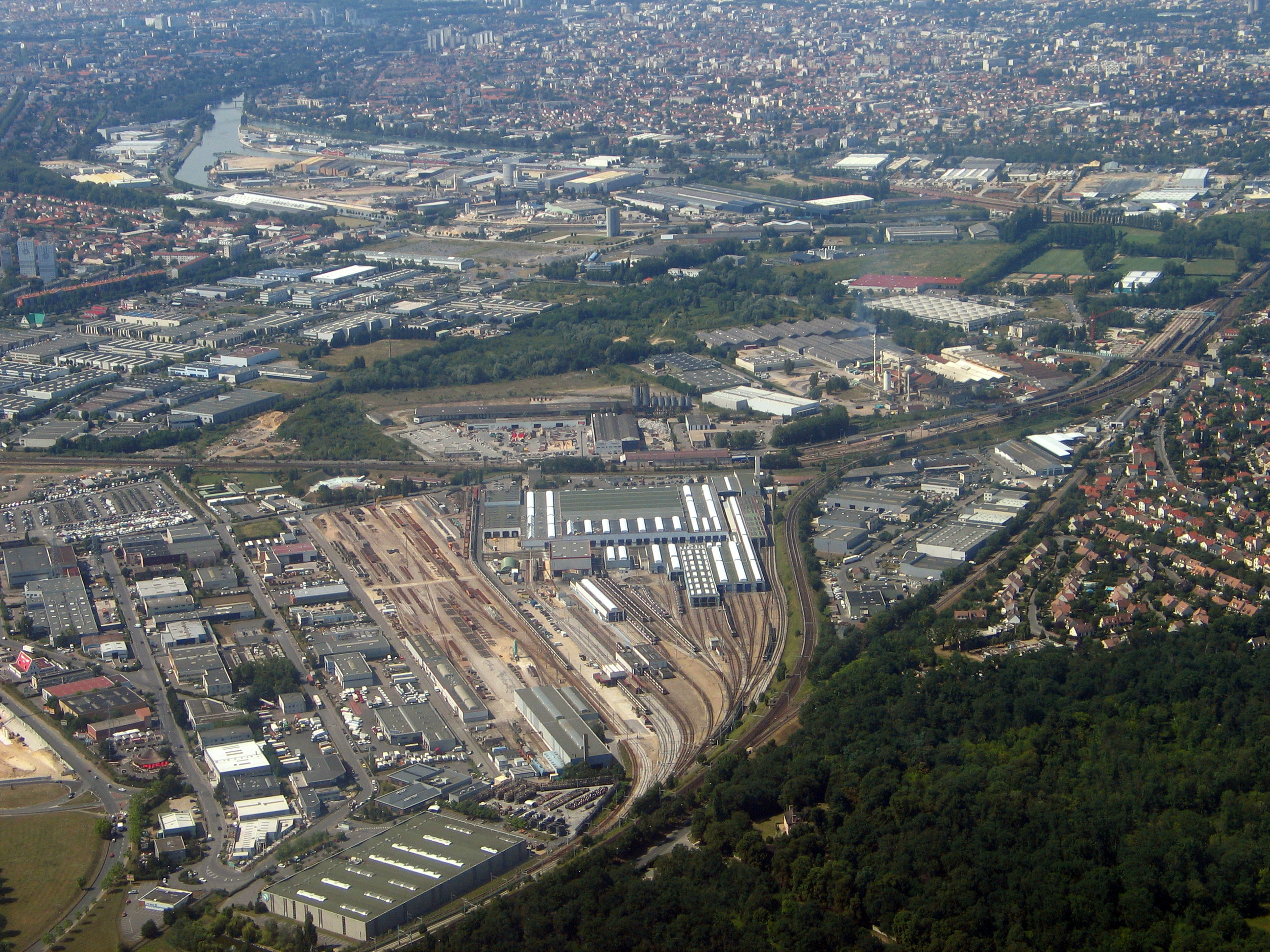 Les ateliers RATP de Sucy-en-Brie et le port de Bonneuil-sur-Marne vus d'avion